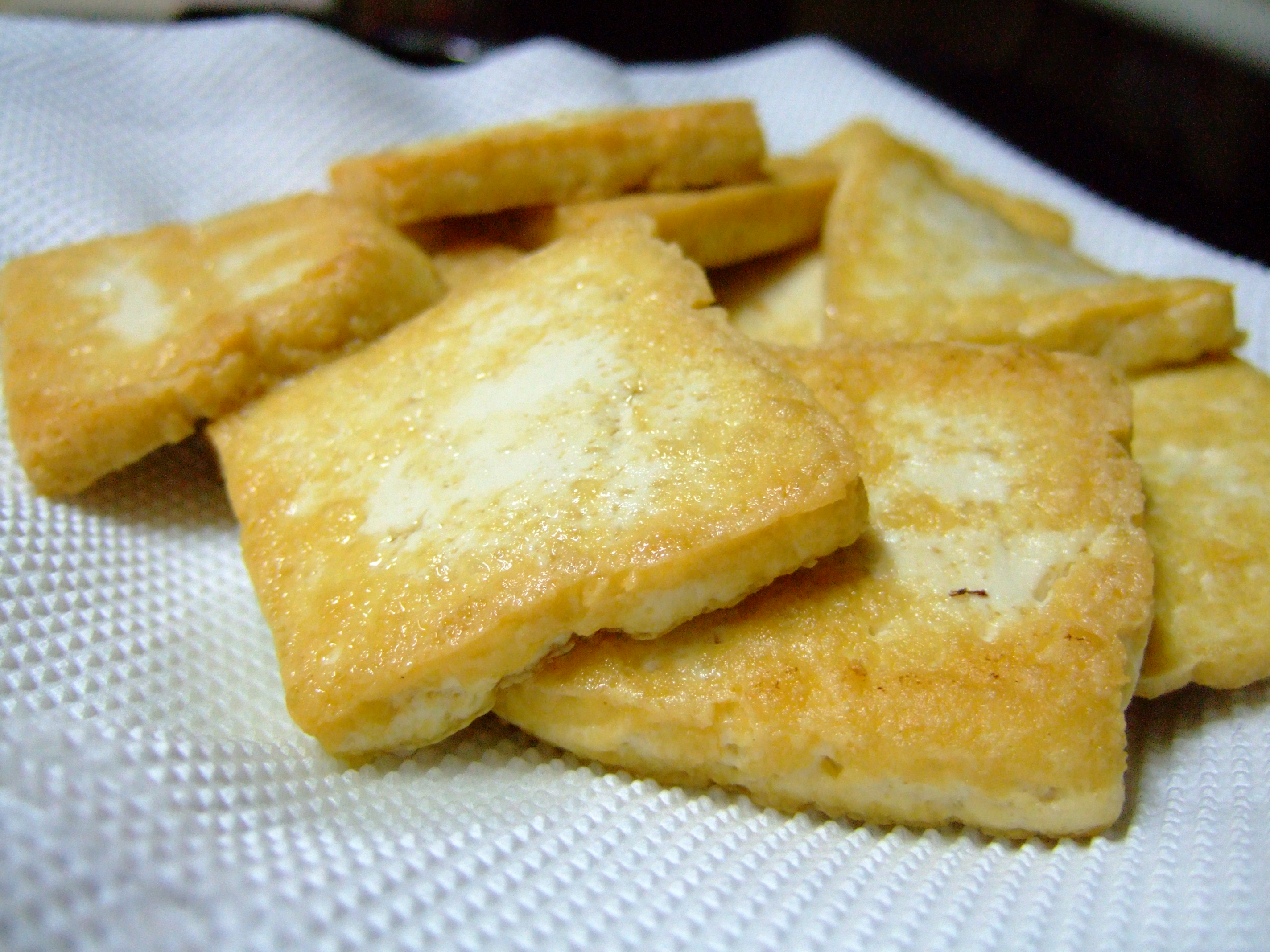 그동안 여러 번 두부를 부쳤지만, 이렇게 깔끔하게 나온 건 첨인 거 같애요. 대만족!